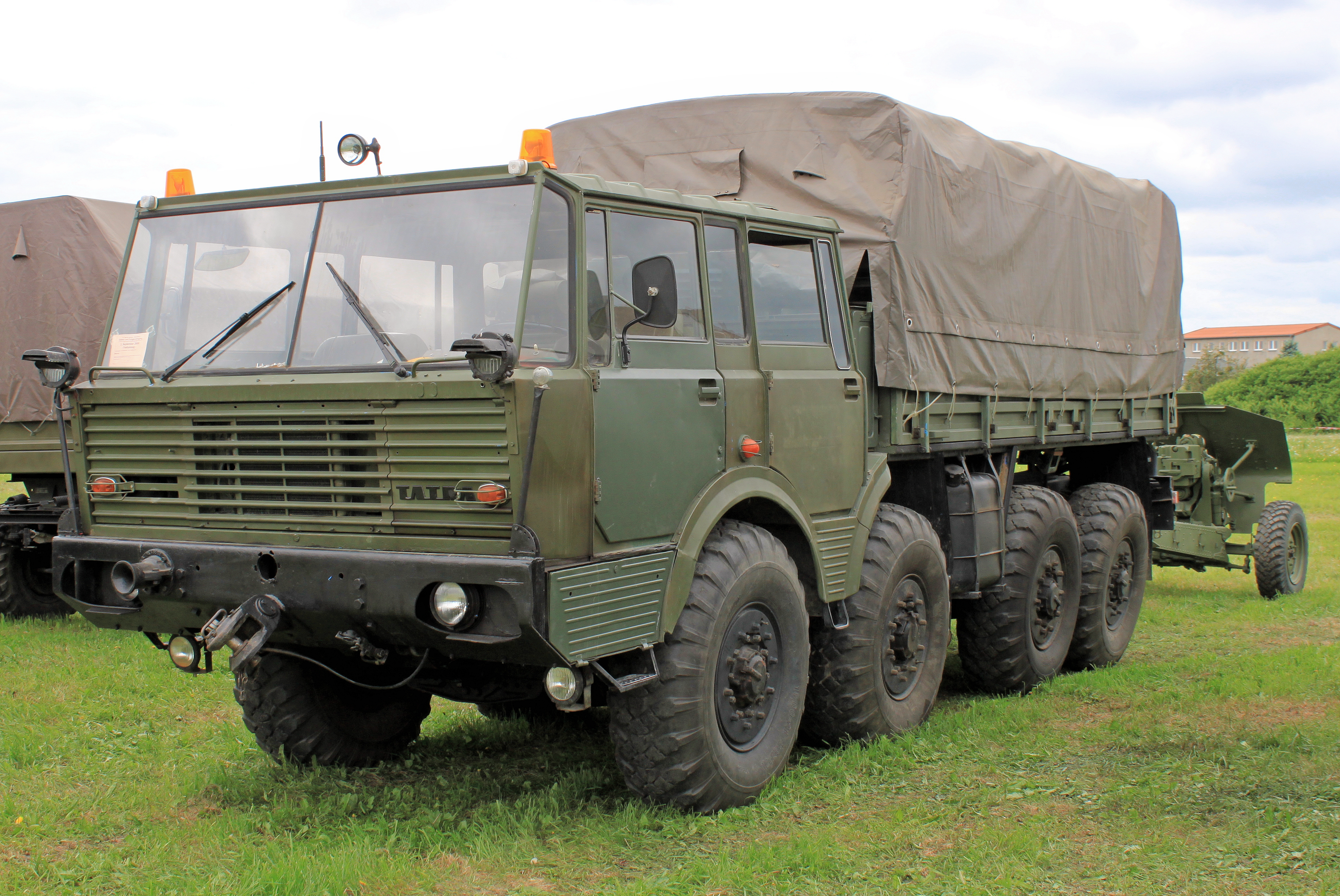 Tatra T-813 8 x 8